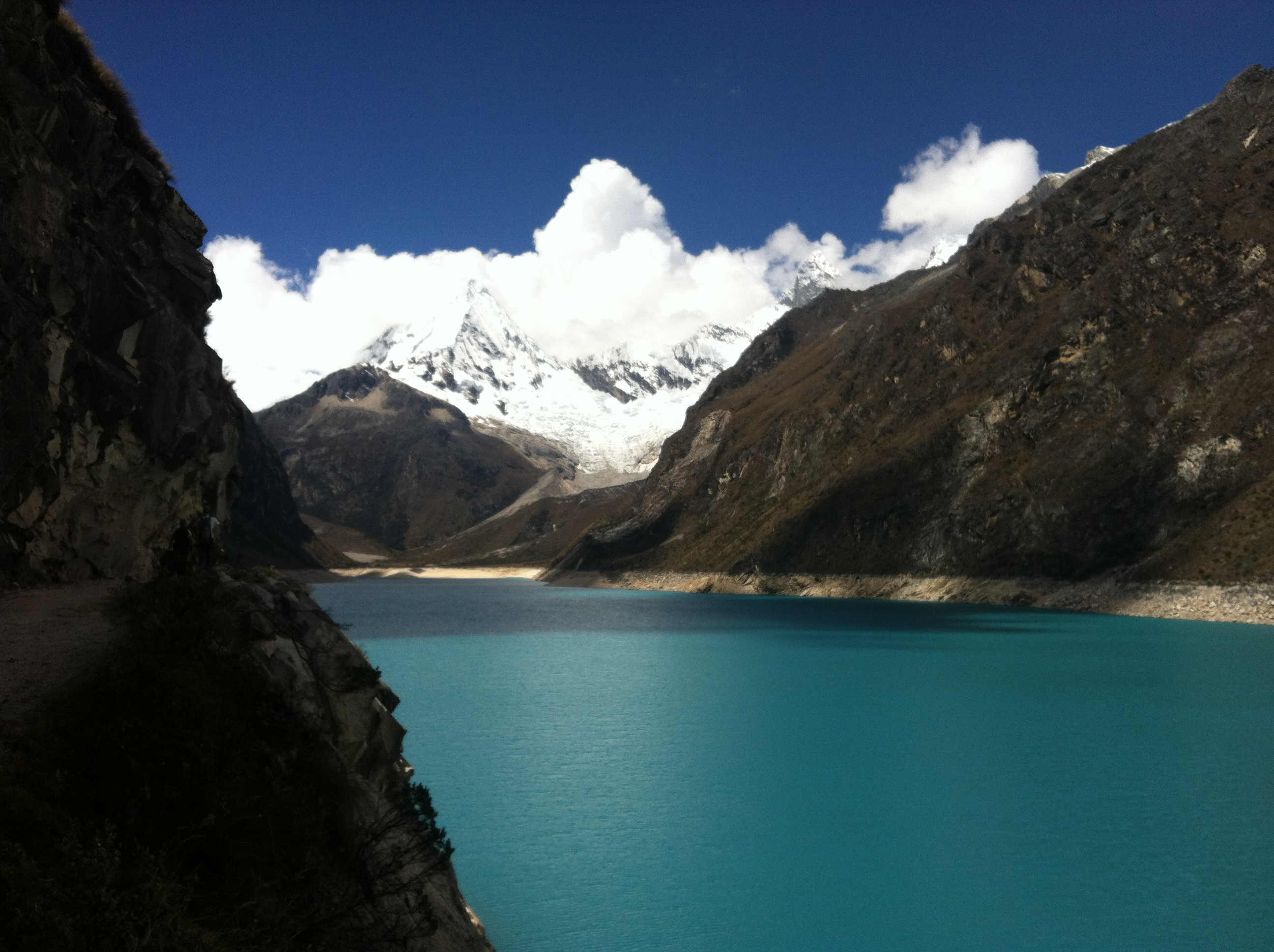 Laguna Parón (Cordillera Blanca)